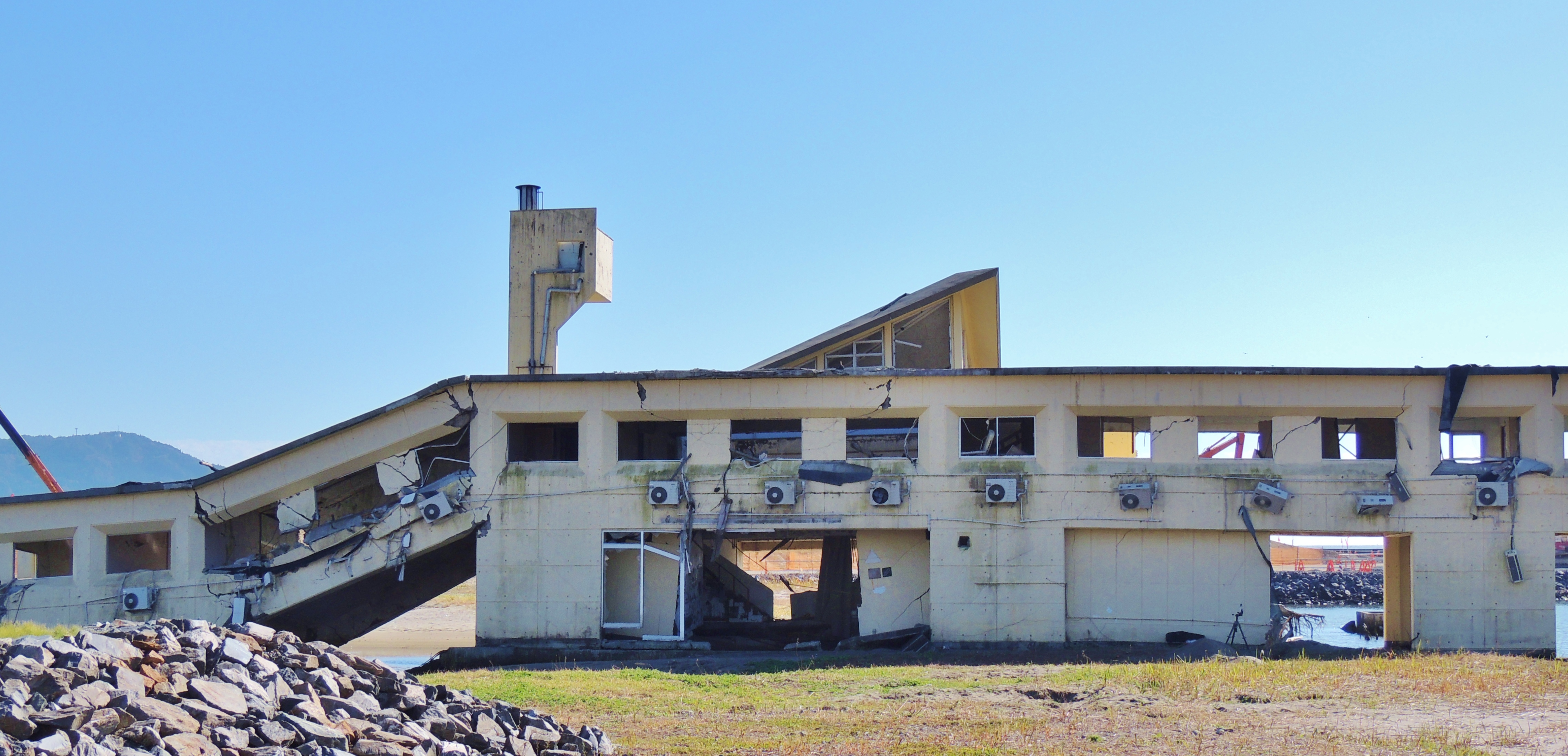 震災遺構 陸前高田ユースホステル